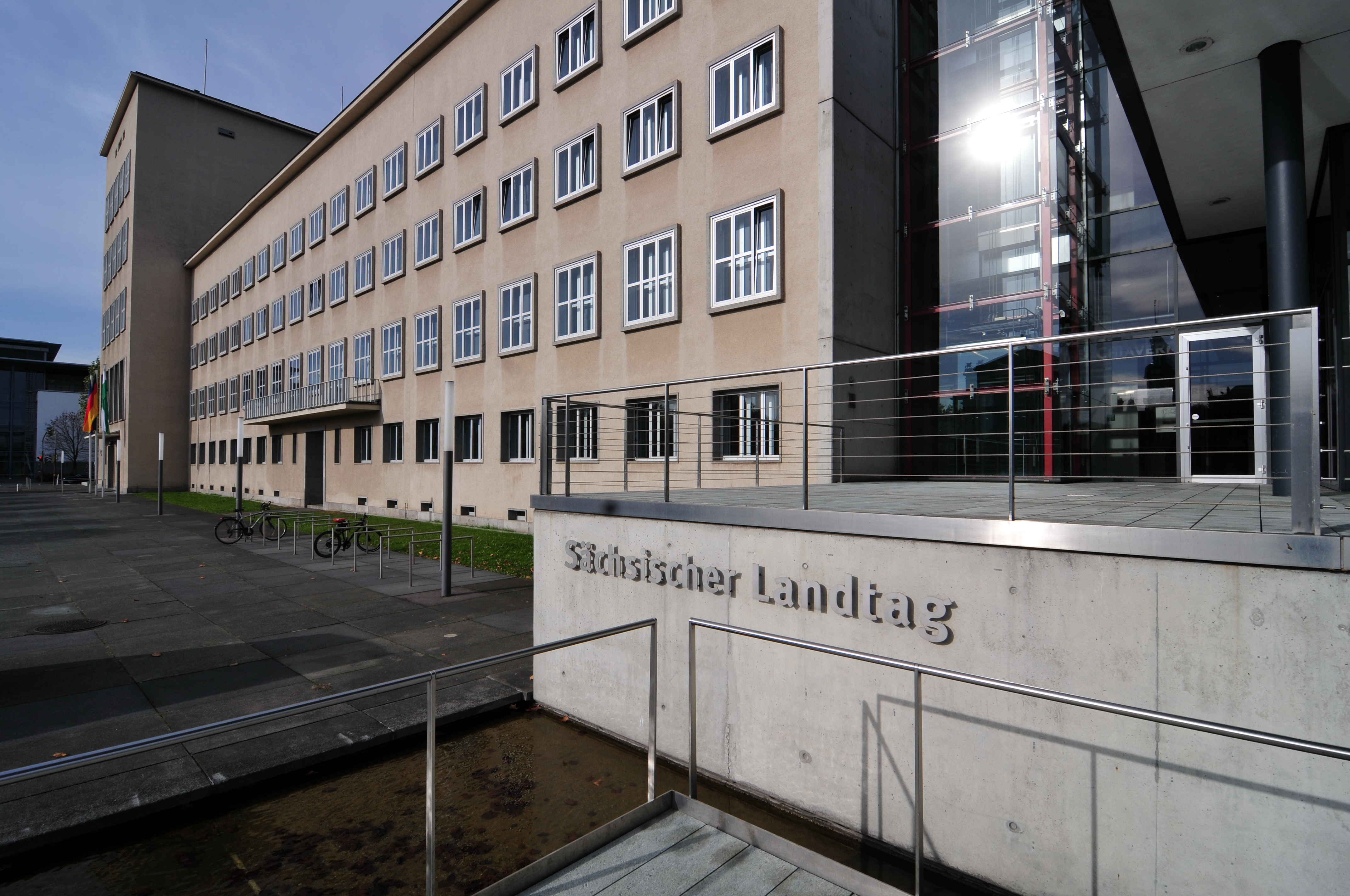 Sächsischer Landtag in Dresden